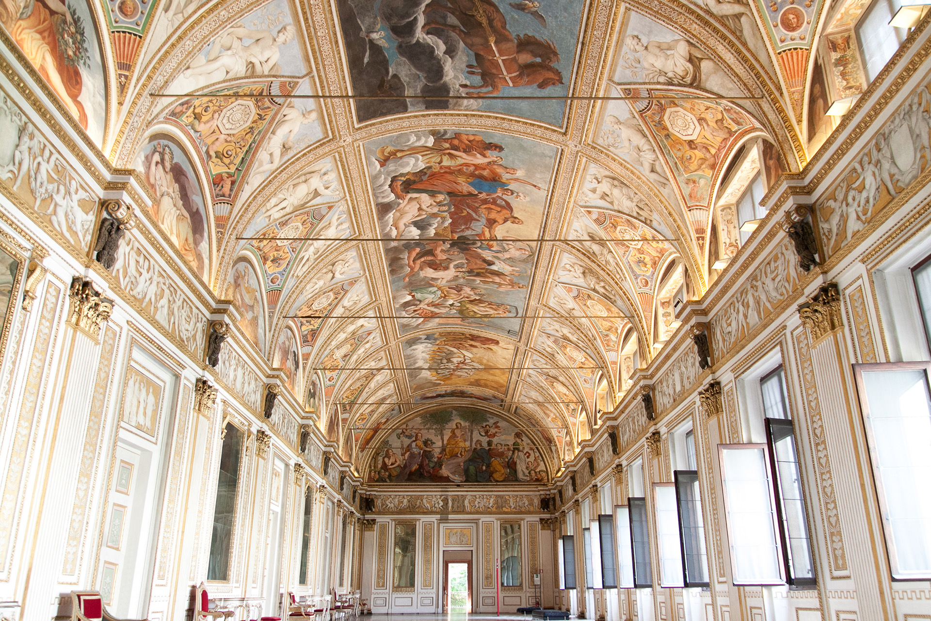 Sala del Palazzo Ducale - Reggia dei Gonzaga. Piazza Sordello, 40, Mantova